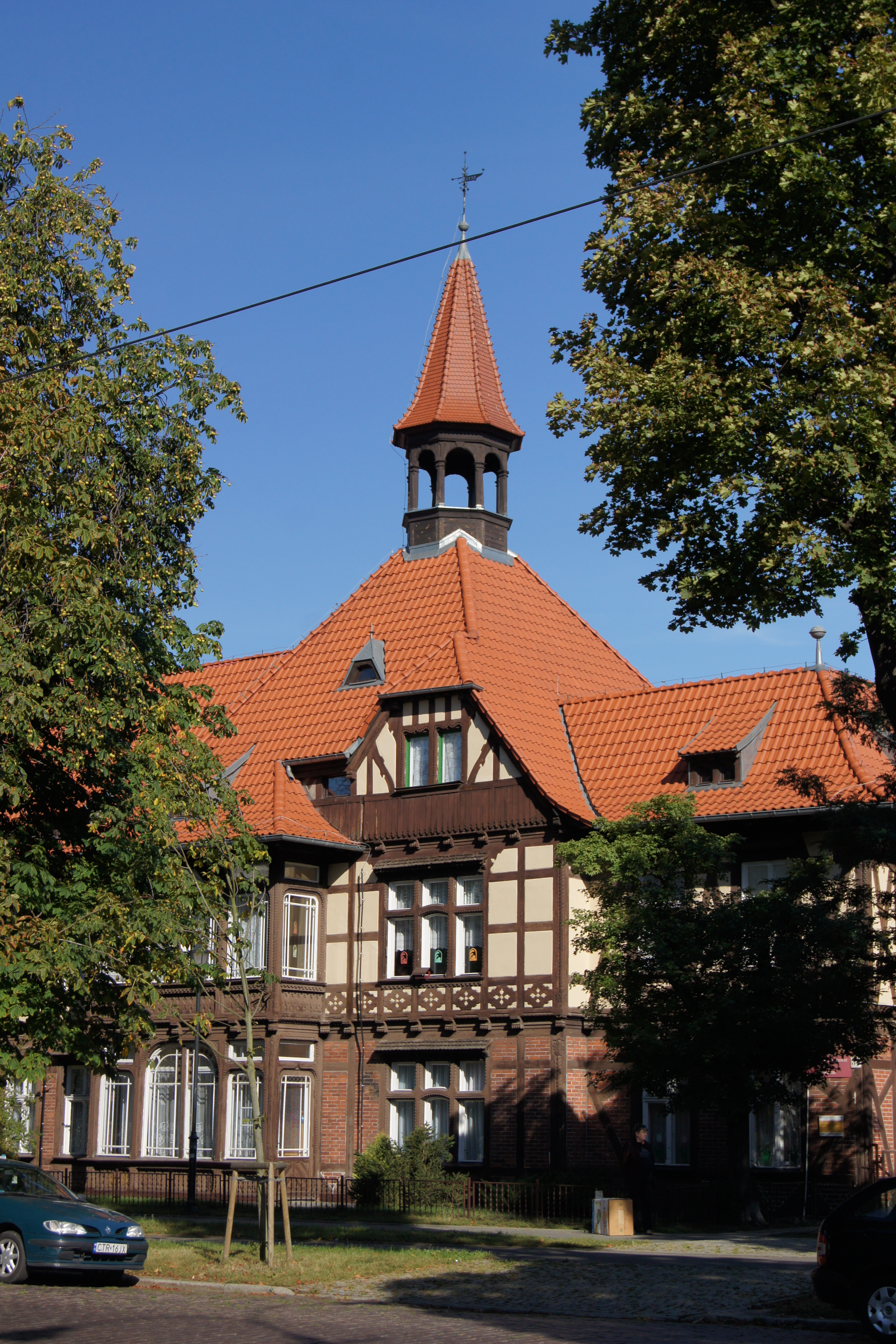 Toruń, ul Bydgoska 34 i 36 - dom, szach., 1895 (zabytek nr rejestr. A/242)